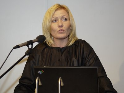 Kulturminister Carina Christensen